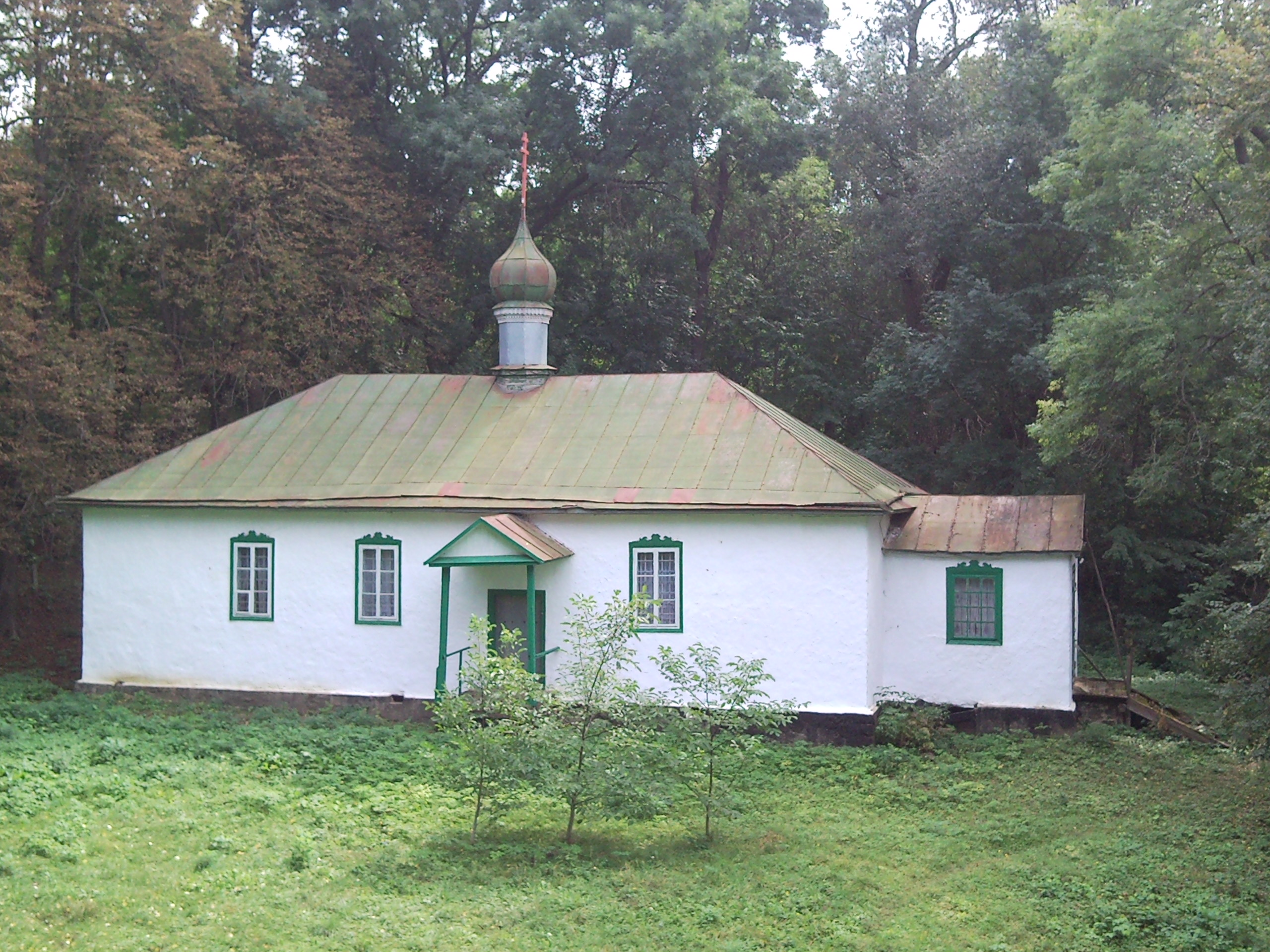 Борсків. Церква Нерукотворного Хреста